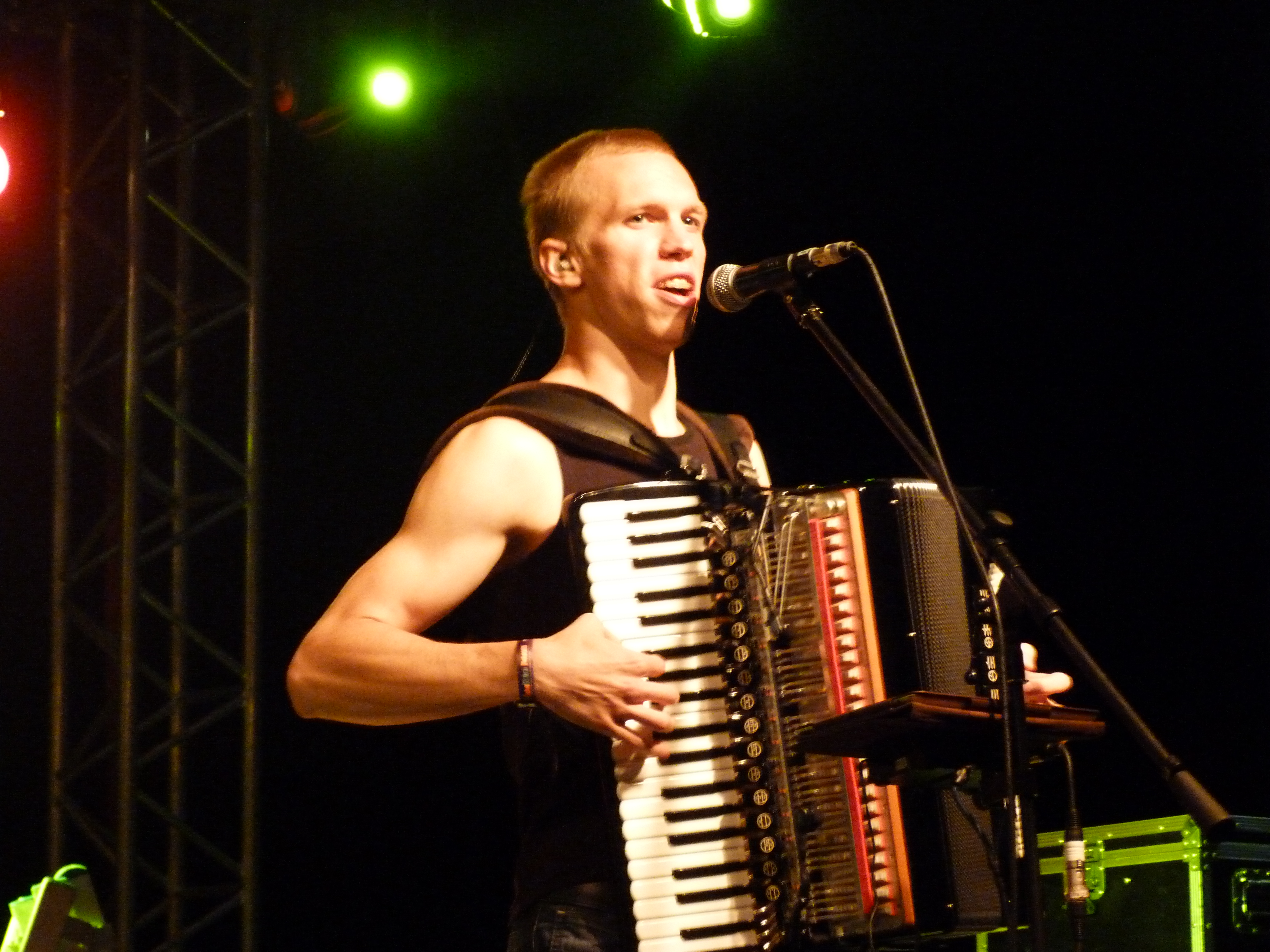 A felvétel 2014. augusztus 6-án, szerdán készült Nagyharsányban a focipályán. 7. Ördögkatlan Fesztivál. Svjata Vatra együttes (Észt-ukrán). ©© Derzsi Elekes Andor, Budapest, 2014, A kép és filmfelvételek egészben, vagy részletekben másolását, bármilyen úton történő sokszorosítását és felhasználását a szerző ellenérték nélkül, jogutódjaira is kihatóan megengedi. Az engedély kiterjed a kereskedelmi célú hasznosításra is. Kéri azonban nevének feltüntetését a felhasználás során. A Metapolisz sorozat valamennyi képe és filmje Creative Commons alatti valamint kereskedelmi - for profit - célra is felhasználható. Ajánlott hivatkozás: Derzsi Elekes Andor: Metapolisz DVD line